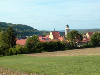 Stadtansicht selbst erstellt am 30.09.2003